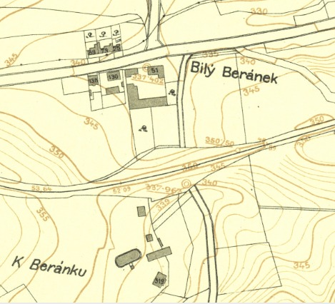 K. ú. Stodůlky, hostinec a křižovatka Bílý Beránek, Výškopisný plán hlavního města Prahy s okolím.